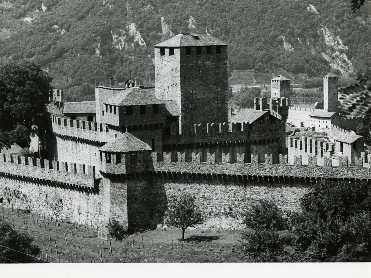 Servizio fotografico : Bellinzona, 1980 / Paolo Monti. - Stampe: 10 : Positivo b/n, gelatina bromuro d'argento/ carta, 24x30. - ((Al verso delle stampe manoscritti i numeri dei negativi corrispondenti (formato 35 mm) con indicazione del fotogramma: 3533/9, 3533/10, 3533/14, 3533/17, 3533/22, 3533/25, 3534/22, 3534/28, 3535/7. - Timbro a inchiostro con copyright: "© Copyright/ Credit to/ Paolo Monti/ Corso Sempione [...]/ Milano". - Sul coperchio della scatola iscrizione didascalica manoscritta a pennarello nero: "Architettura/ Castelli". - Occasione: Documentazione per la pubblicazione: Vincenti Antonello, "Castelli viscontei e sforzeschi", Milano, Rusconi immagini, 1981. - Fonte: Agenda di Paolo Monti: Nikon Leika 3001-/ Monti 1978 (1978-1982), presso Archivio Paolo Monti. - Fonte: Monografia di Vincenti, Antonello: Castelli viscontei e sforzeschi, Milano, Rusconi immagini (1981)